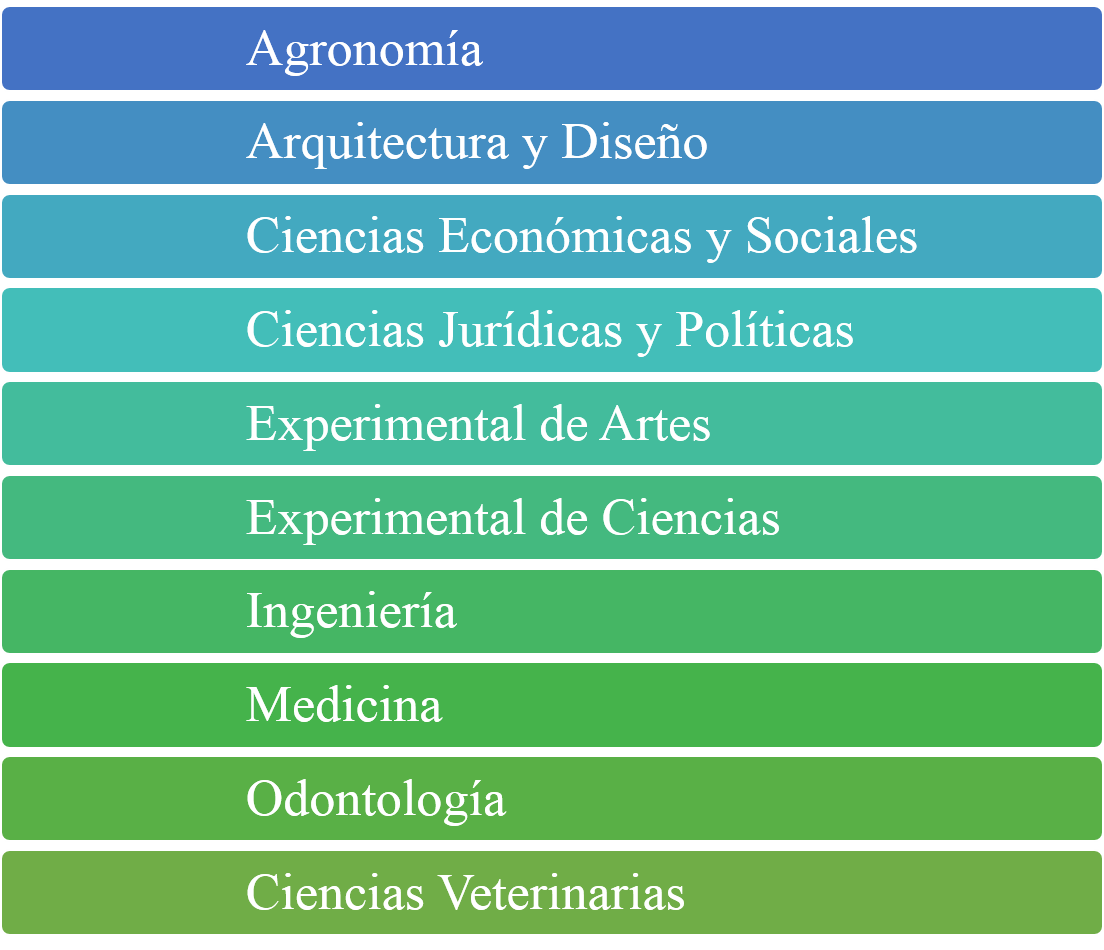 Grafico donde se muestran las facultades que constituyen la universidad del zulia